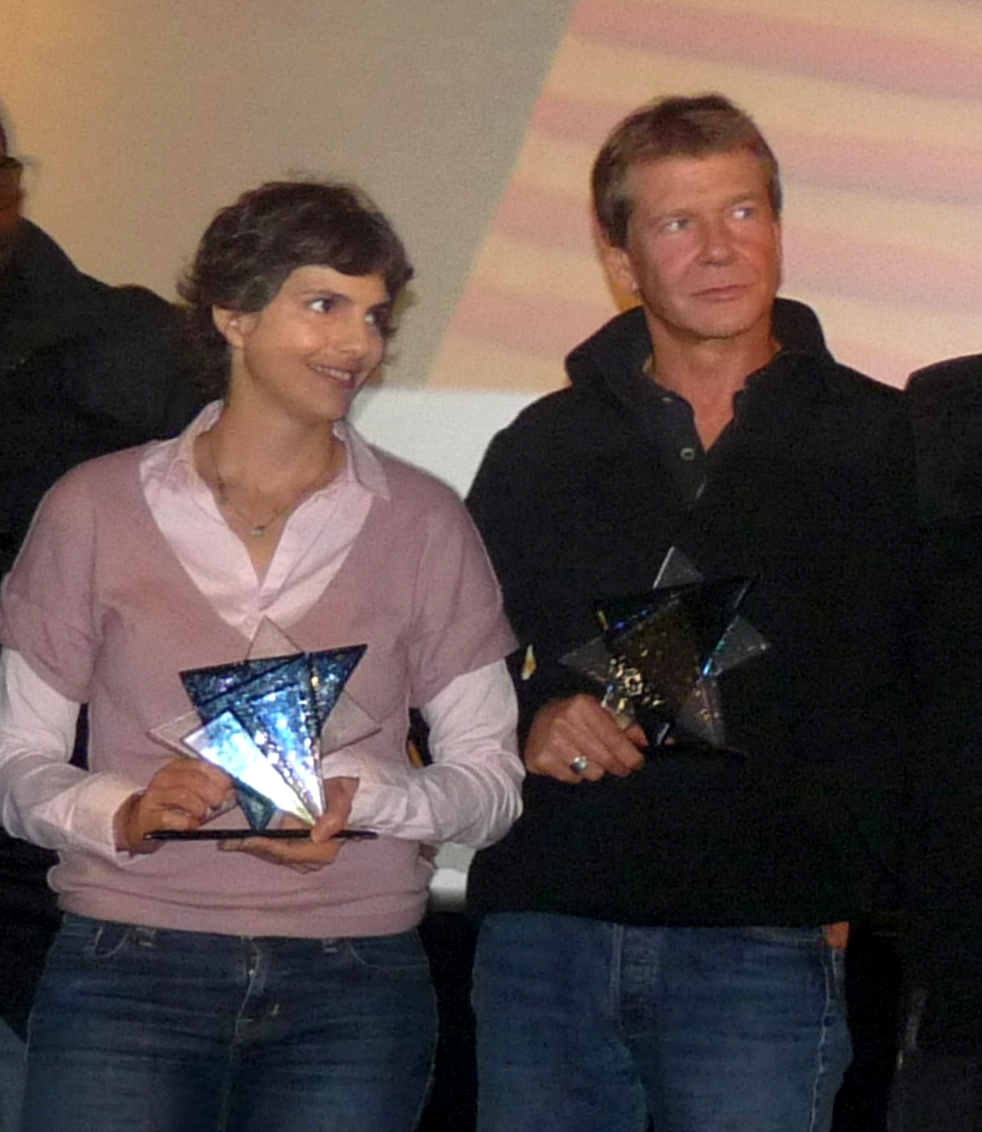 Remise de prix à PATRICK BETHUNE